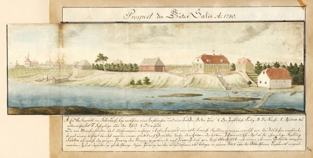 Scan from Johann Christoph Brotze's book Sammlung verschiedner Liefländischer Monumente. Prospect des Gutes Salis Anno 1780 [die Ansicht].